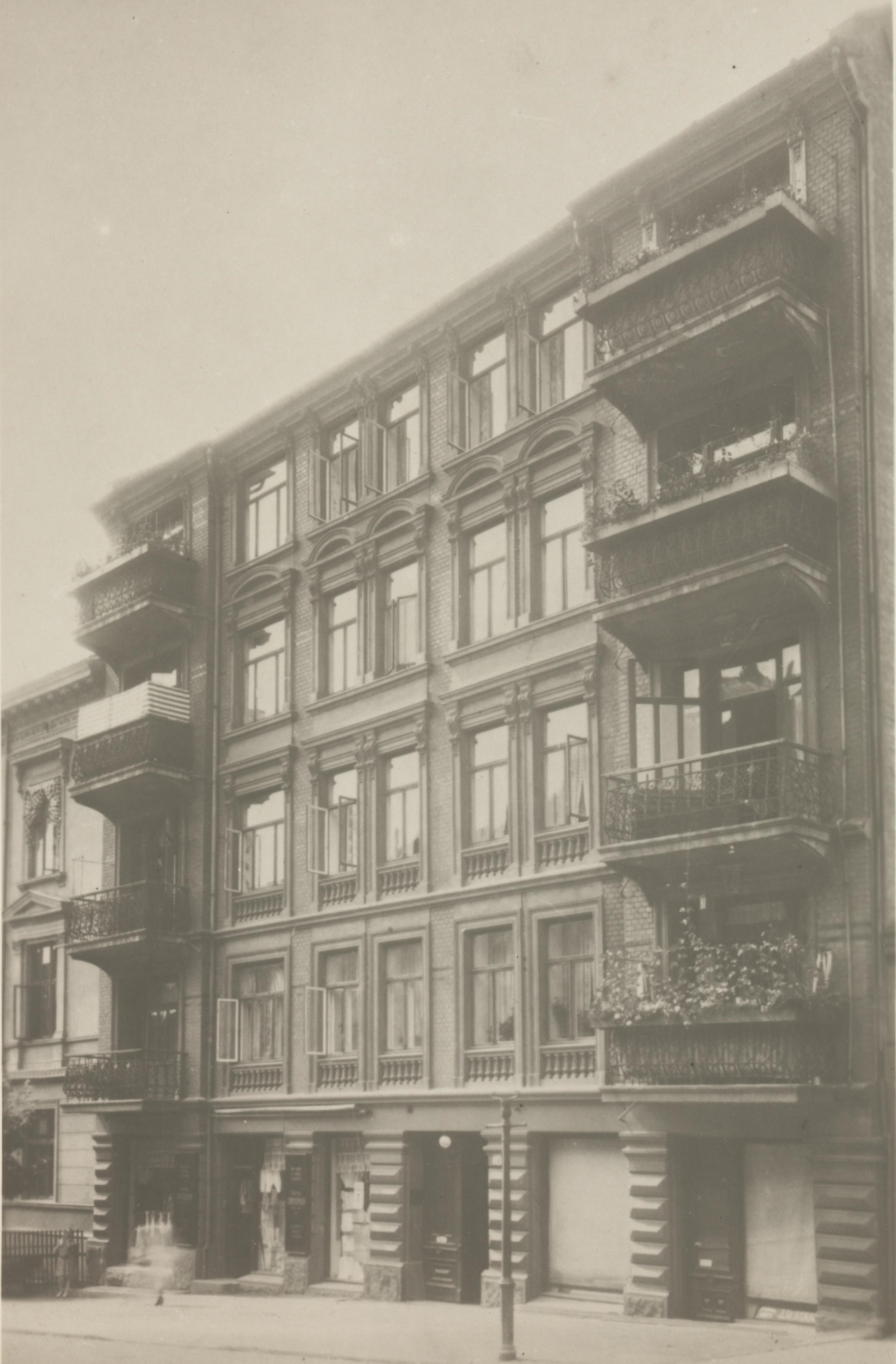 Bildet er hentet fra Nasjonalbibliotekets bildesamling Huitfelds gate 19, Oslo, Oslo